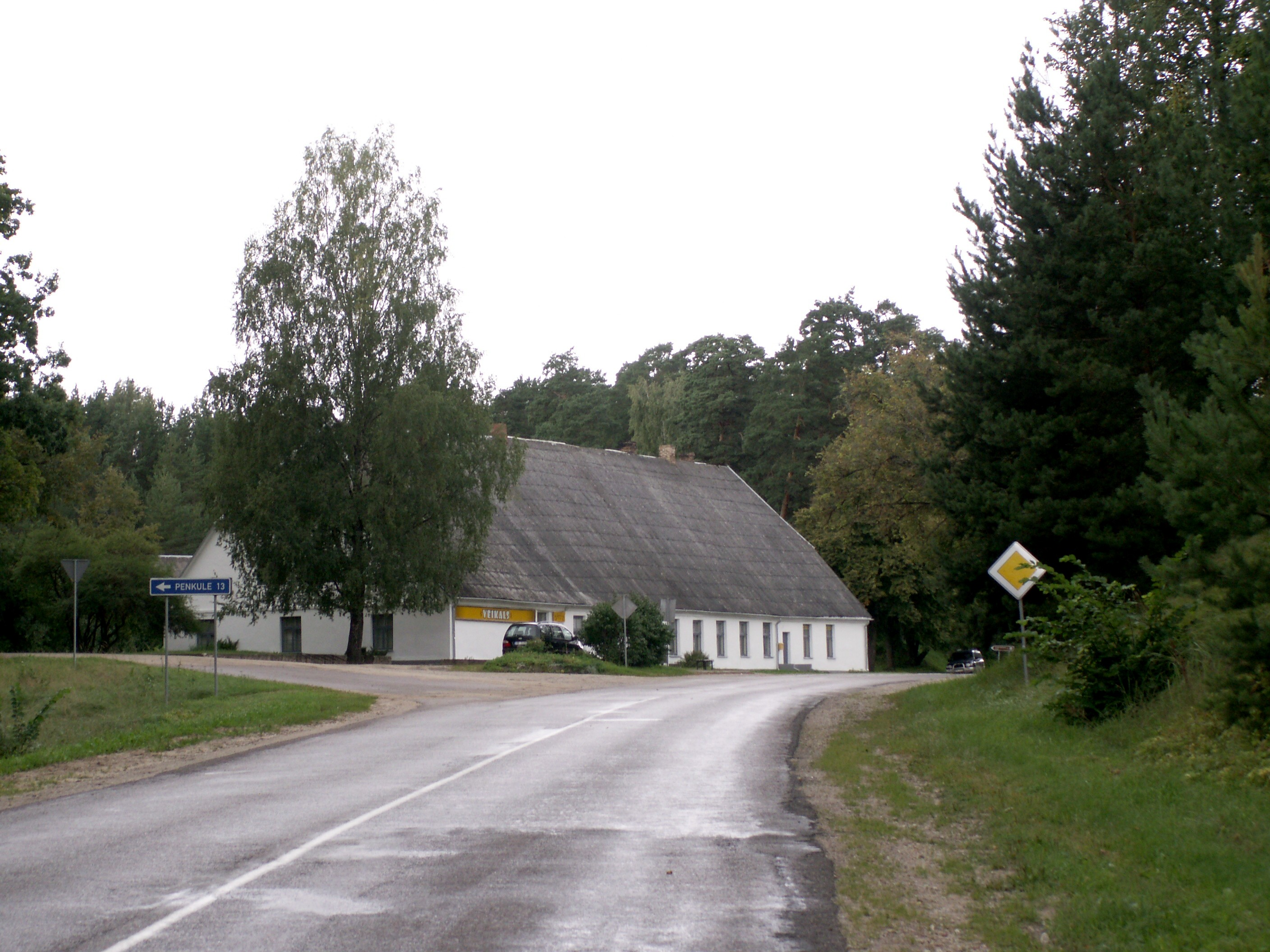 Tervetė, Tervetės pagastas, Latvija